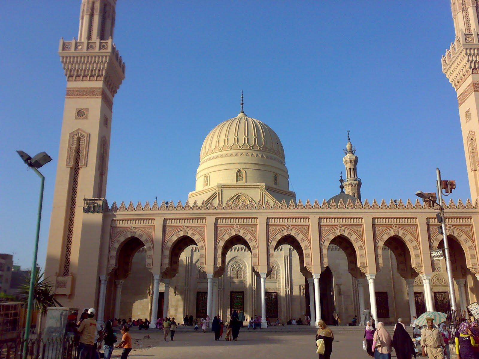 مسجد أحمد البدوي بمدينة طنطا